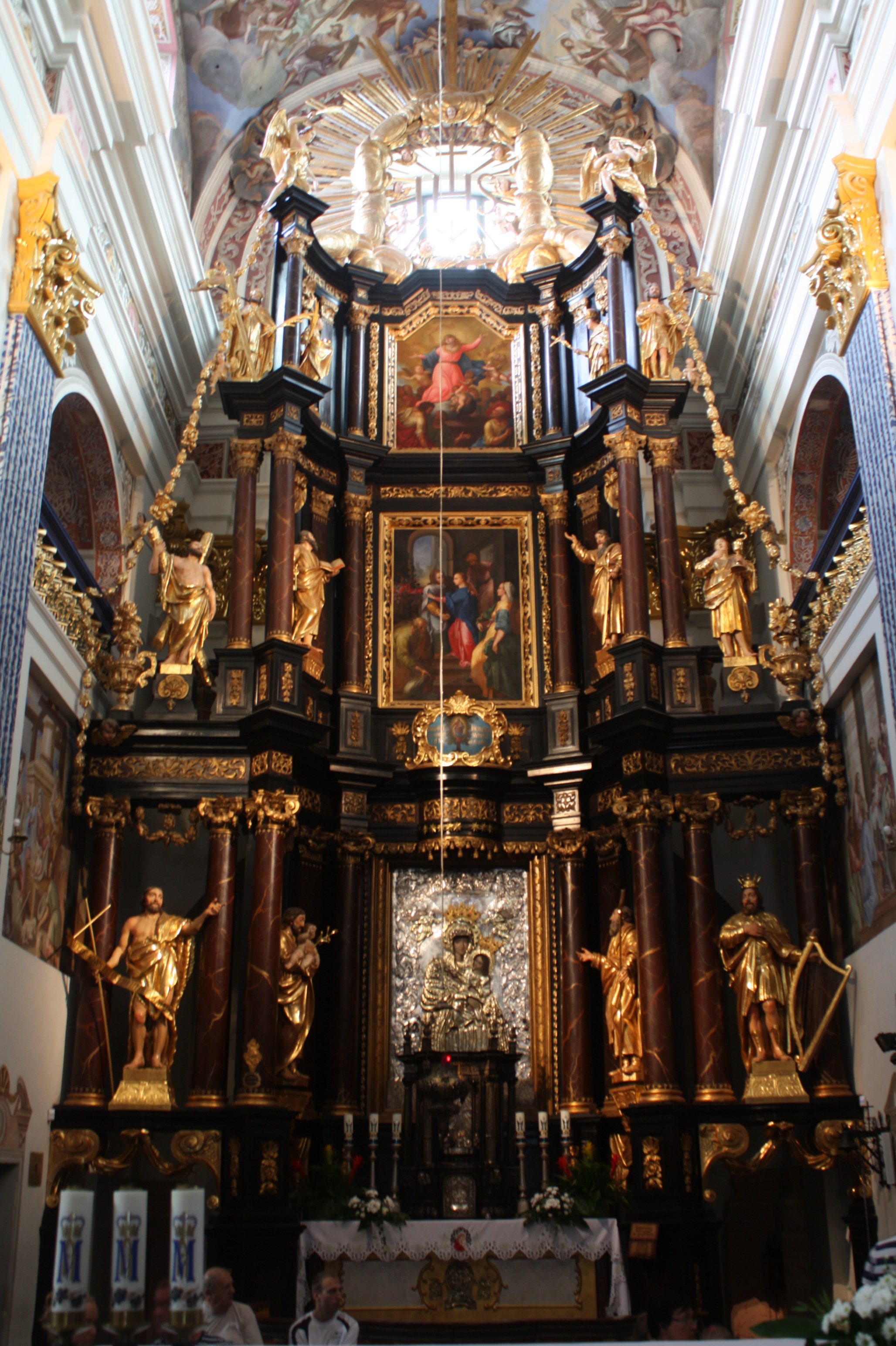 Altare maggiore della basilica di Santa Maria a Święta Lipka, opera di Krzysztof Peucker